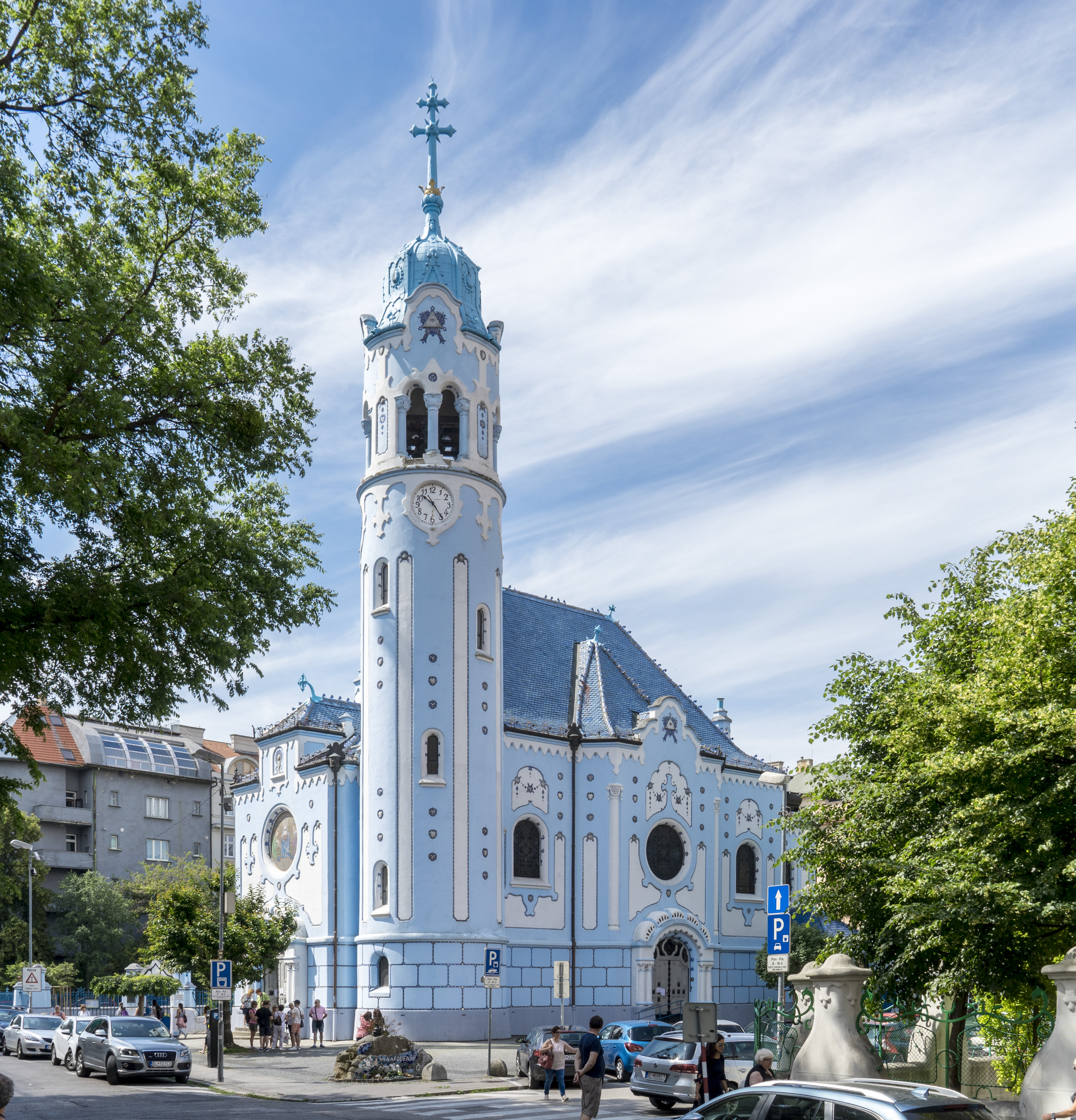 Blue Church, Bratislava, Northeast